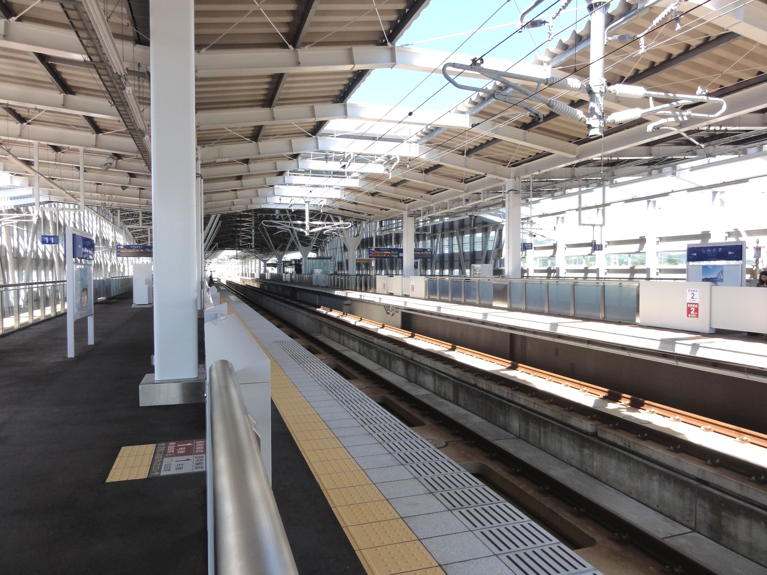 新鳥栖駅ホーム